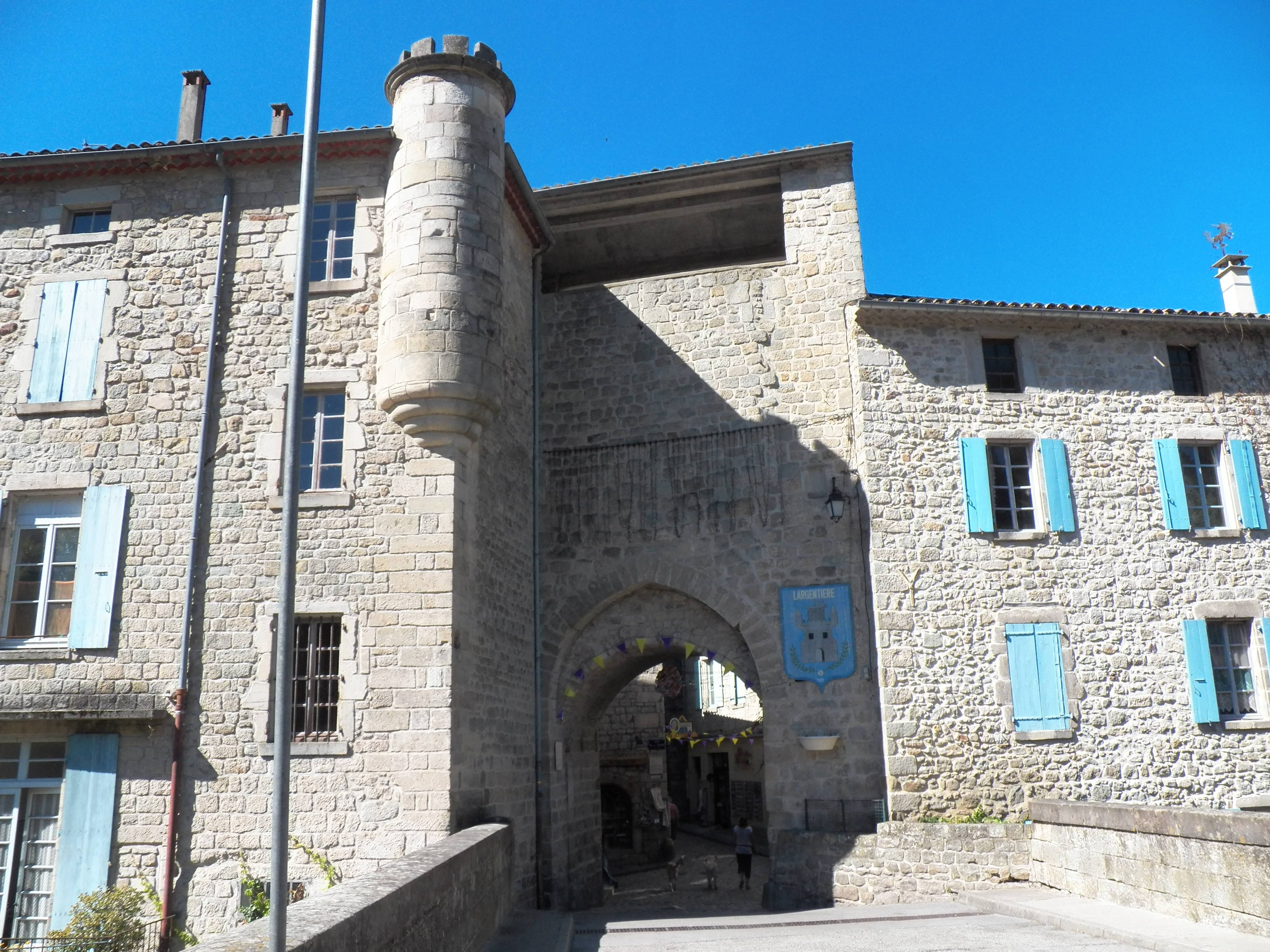 Vestiges des remparts de Largentière(Ardèche) : le pont et la porte des Rècollets.